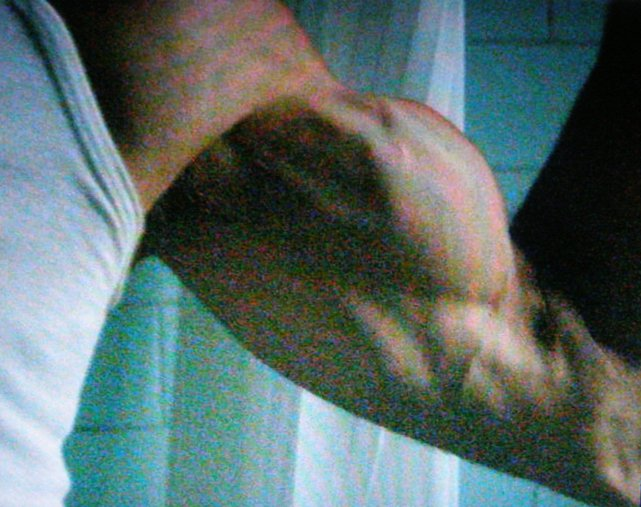 Esempio di bicipite alla massima flessione. Unknown bicep